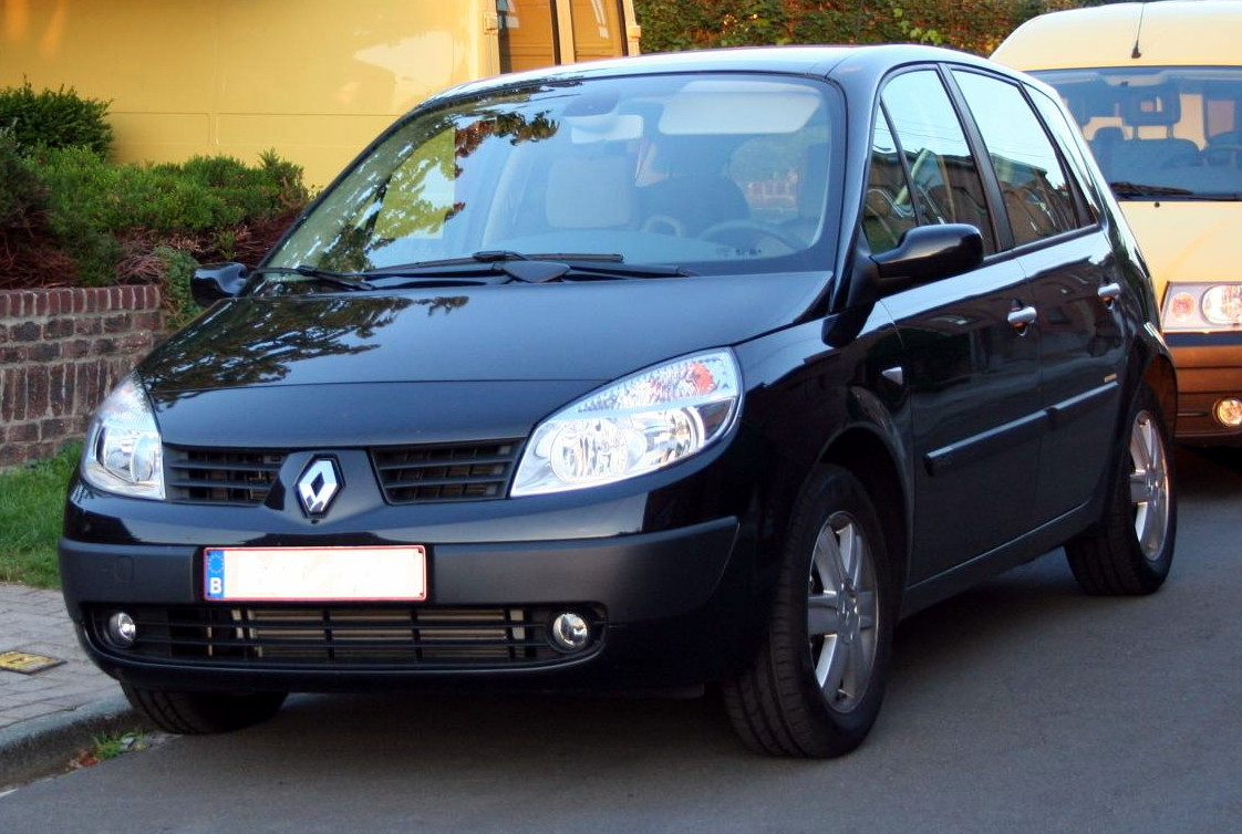 Photo de la Renault Scenic